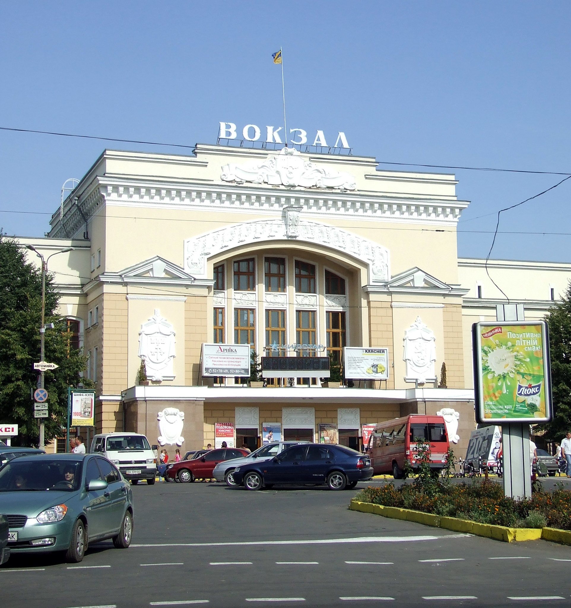 Вокзал станції Тернопіль